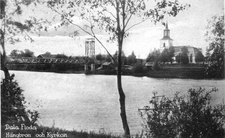 Gamla hängbron i Dala-Floda